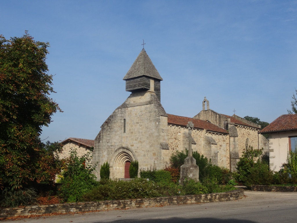 Église Saint-Martin de Saint-Martin-de-Jussac